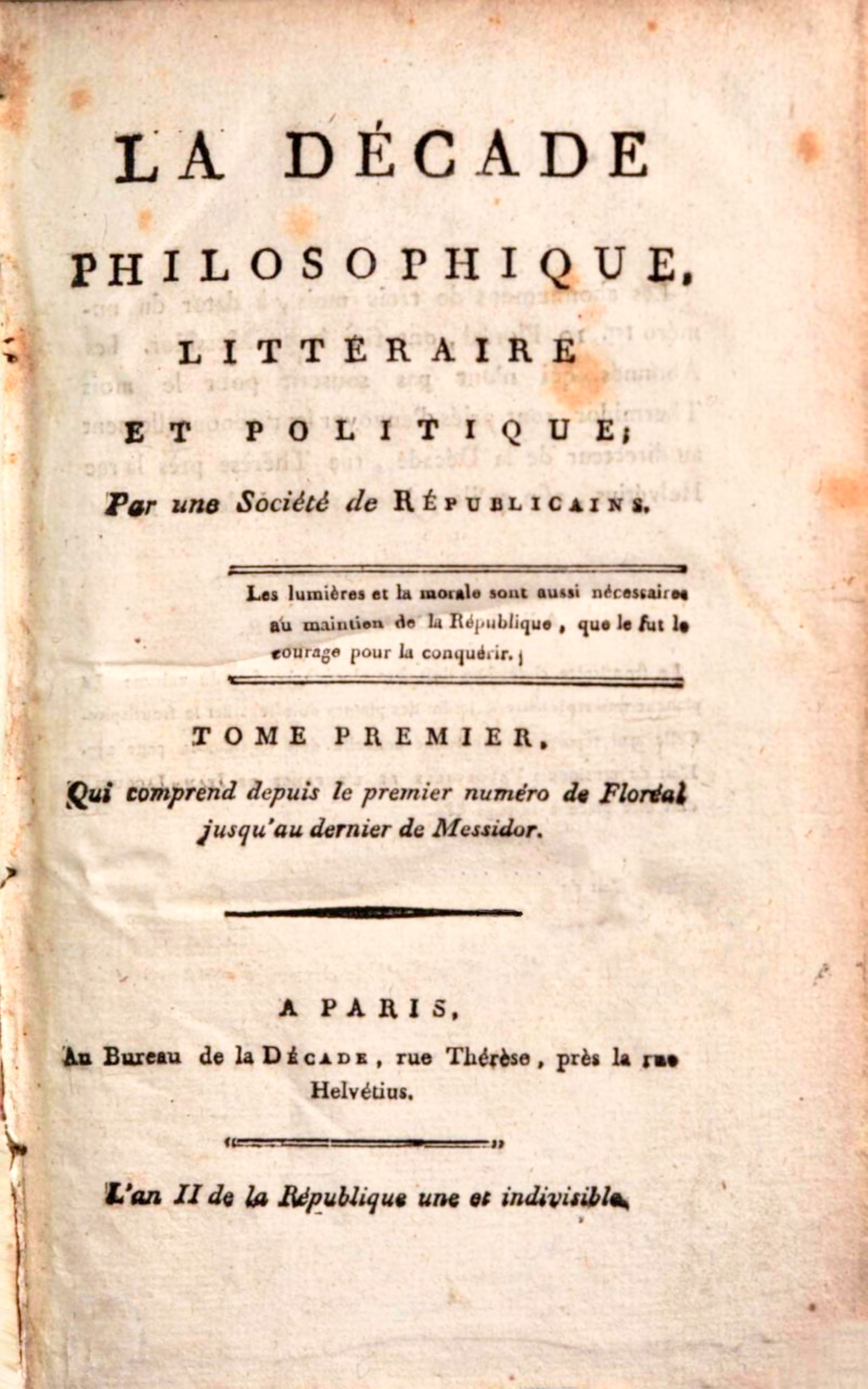 La Décade philosophique, littéraire et politique, tome 41, année 12, numéro 20.